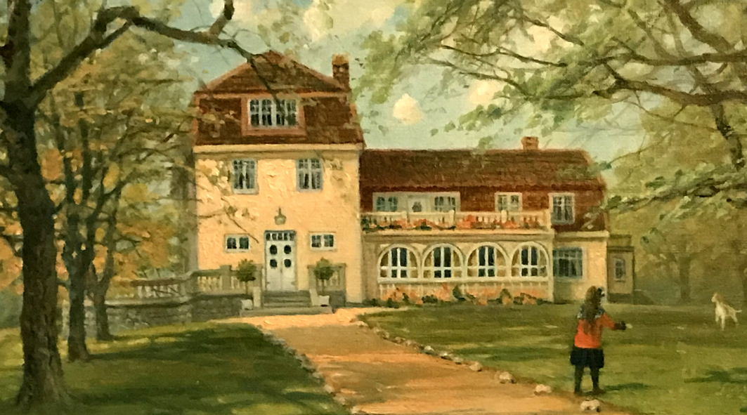 Huvudbyggnad i industrikoncernen Nättraby Läderfabrik i Blekinge, Sverige